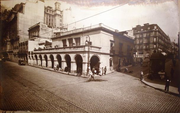 Vista del Gran Hotel Nacional en Buenos Aires, que ocupaba la esquina de Avenida Corrientes con Paseo de Julio (hoy Avenida Leandro N. Alem), hasta la construcción del Edificio Comega en 1933. Atrás se ve un lote demolido, donde se construyó luego el Jousten Hotel. Corrientes todavía era una calle angosta.